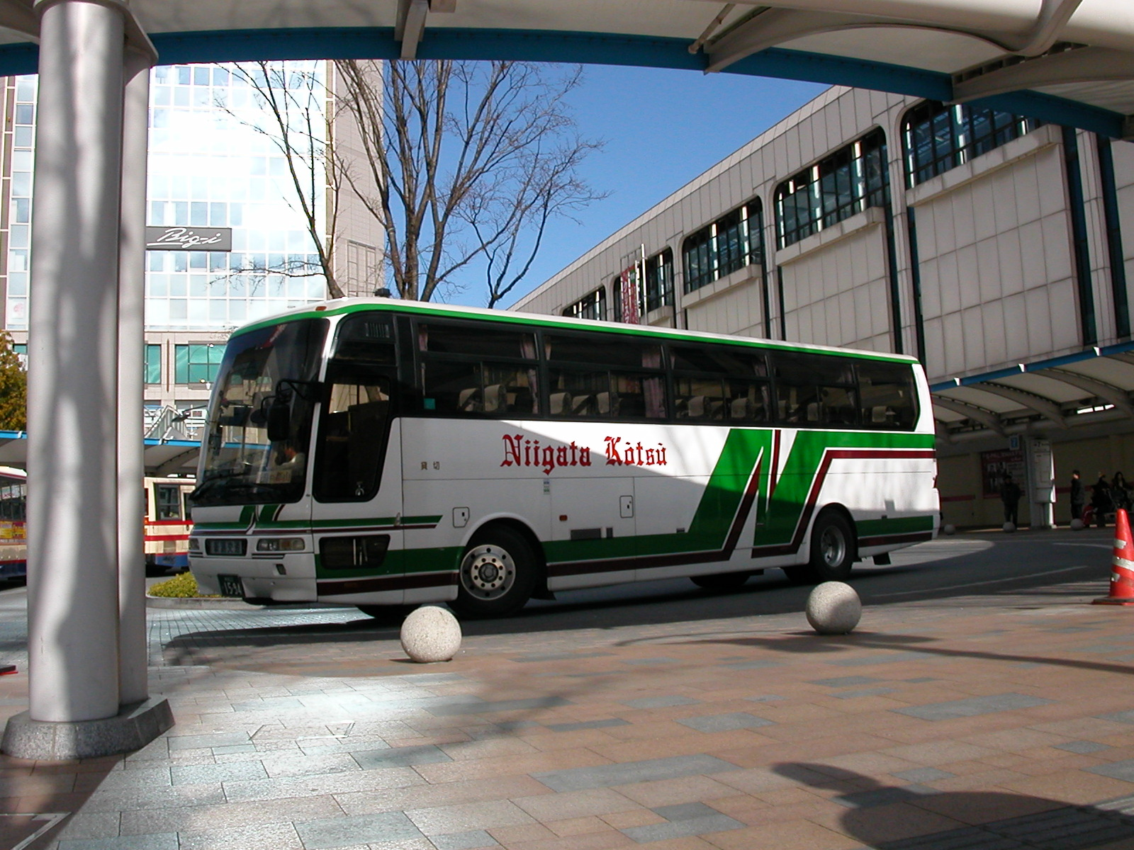 新潟交通のバス。2004年10月に発生した新潟中越地震による、高速バス新潟～郡山線の増発時に、郡山駅前バスターミナルにて撮影。